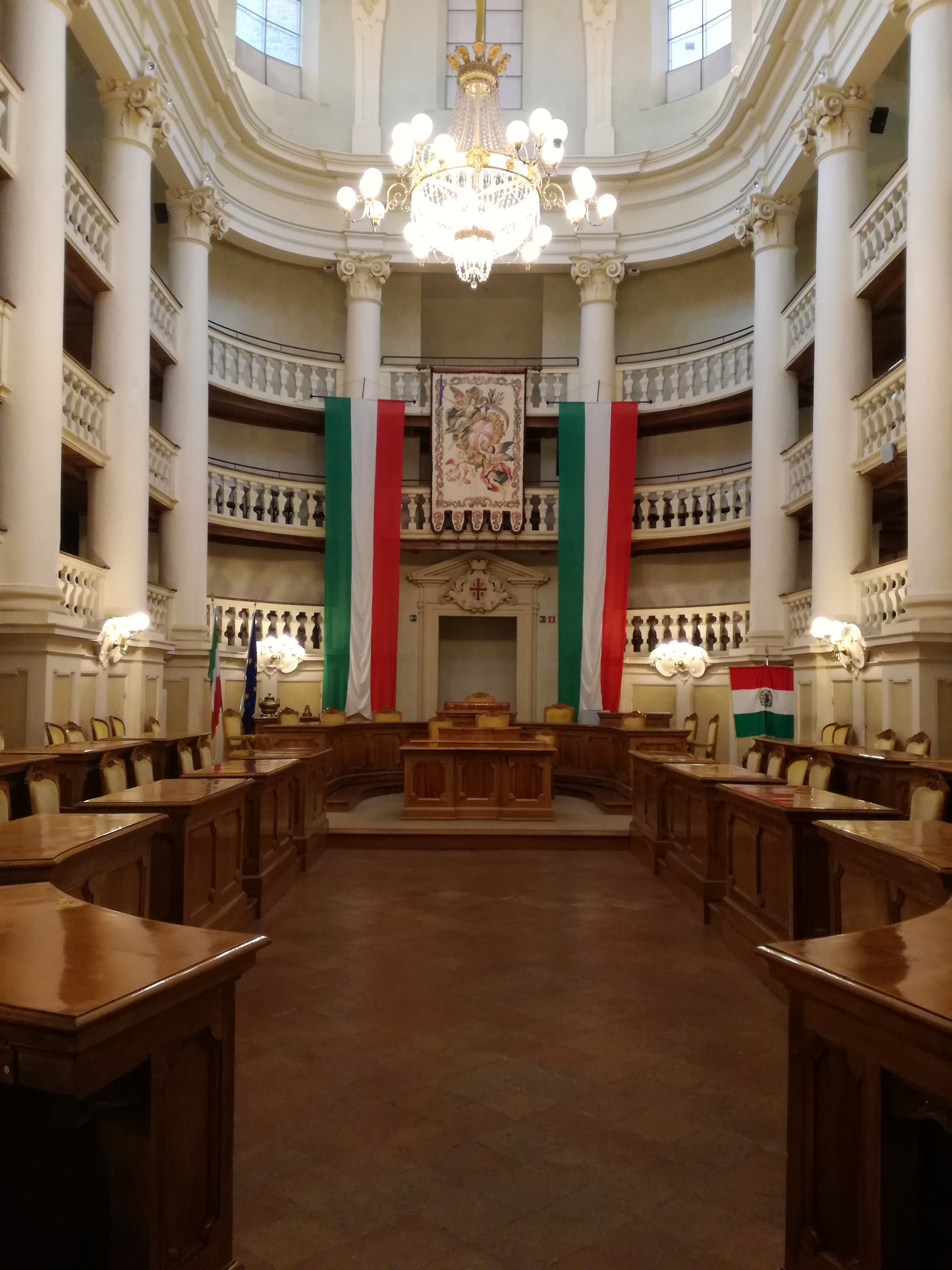 Sala del Tricolore im Rathaus von Reggio nell'Emilia